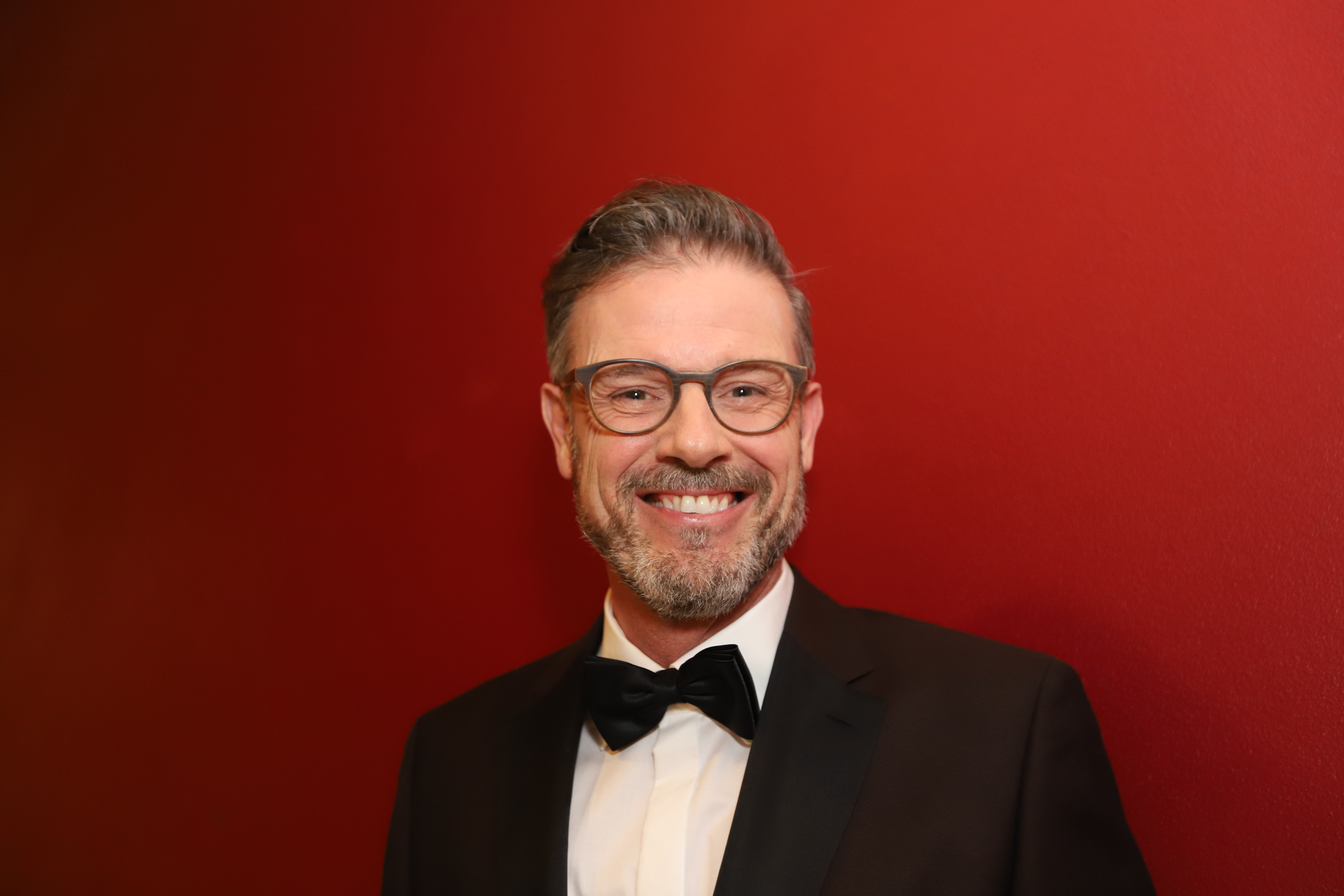 Verleihung Carl-Lämmle-Preis 2019